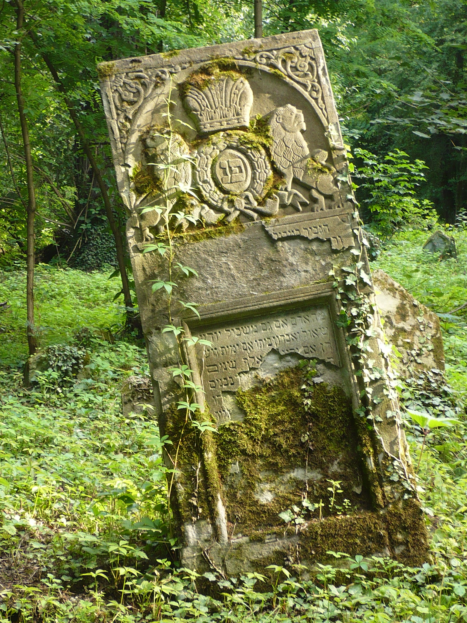 Przemyśl, nowy cmentarz żydowski